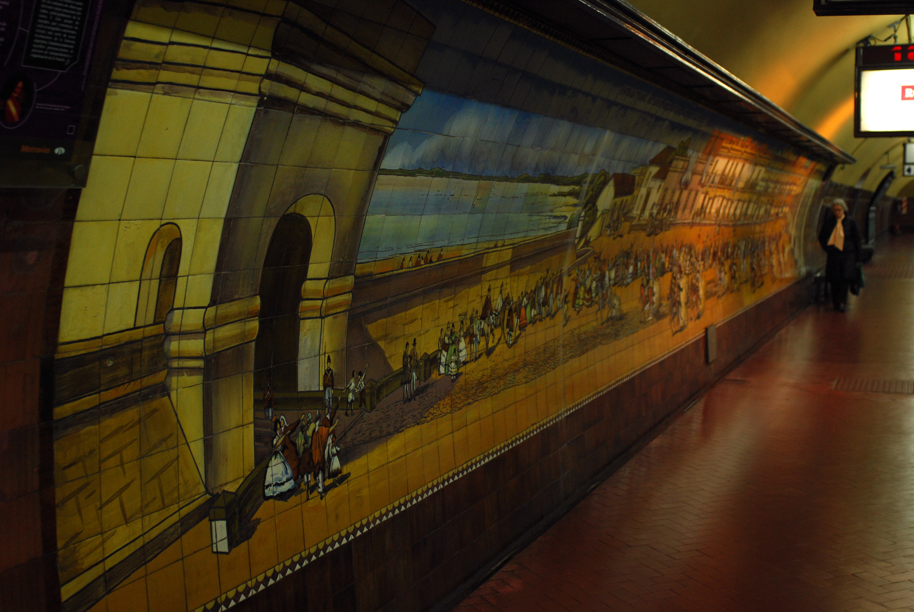 Mural de la estación Gral. Urquiza de la línea E de subtes en Buenos Aires, Argentina